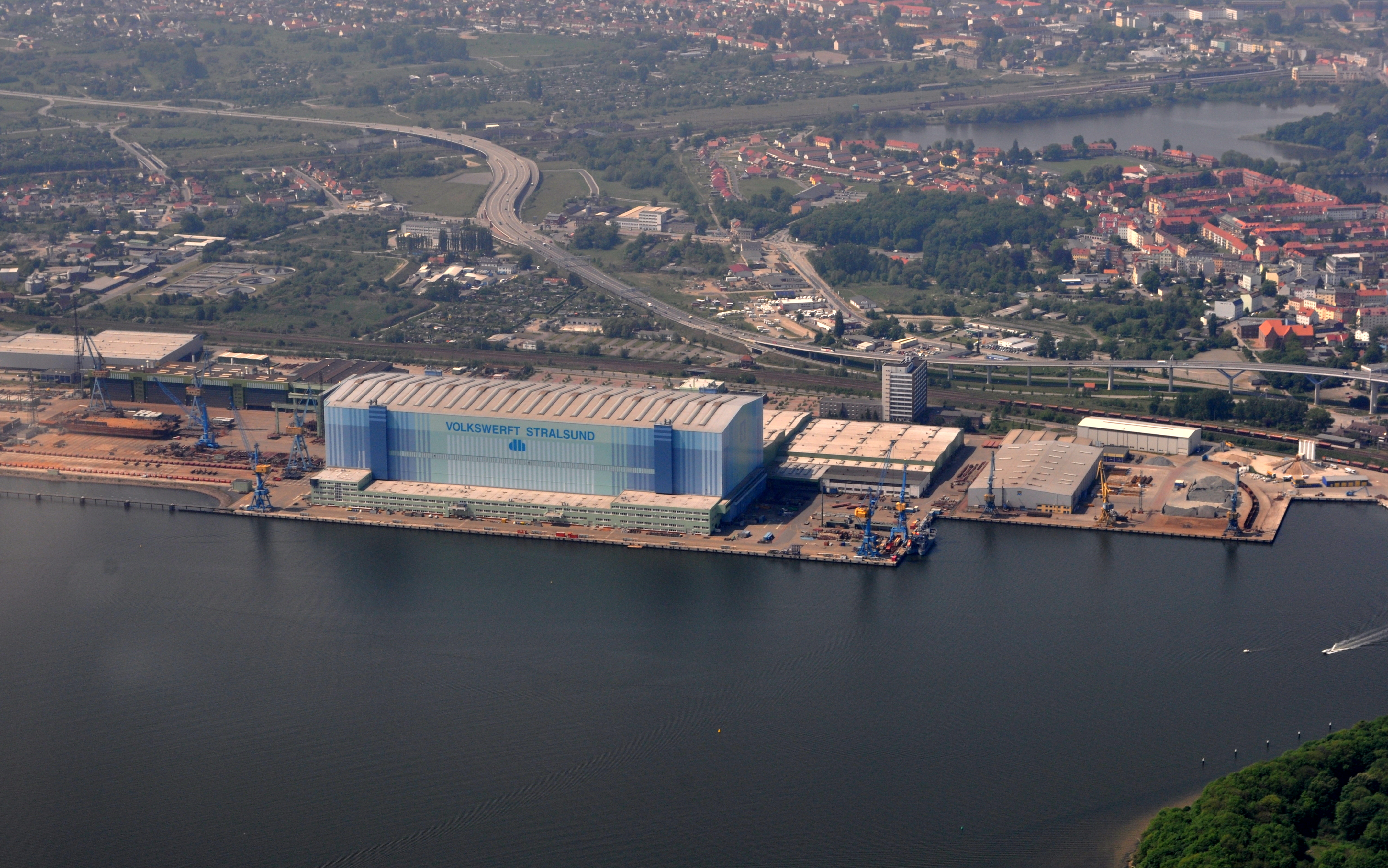 Die Bilder wurden von mir während eines einstündigen Rundflugs ab Flugplatz Güttin am 21. Mai 2011 aufgenommen. Die Bildbeschreibung steht im Dateinamen. Aufgenommen mit einer Nikon D5000 durch das Seitenfenster des Flugzeugs.